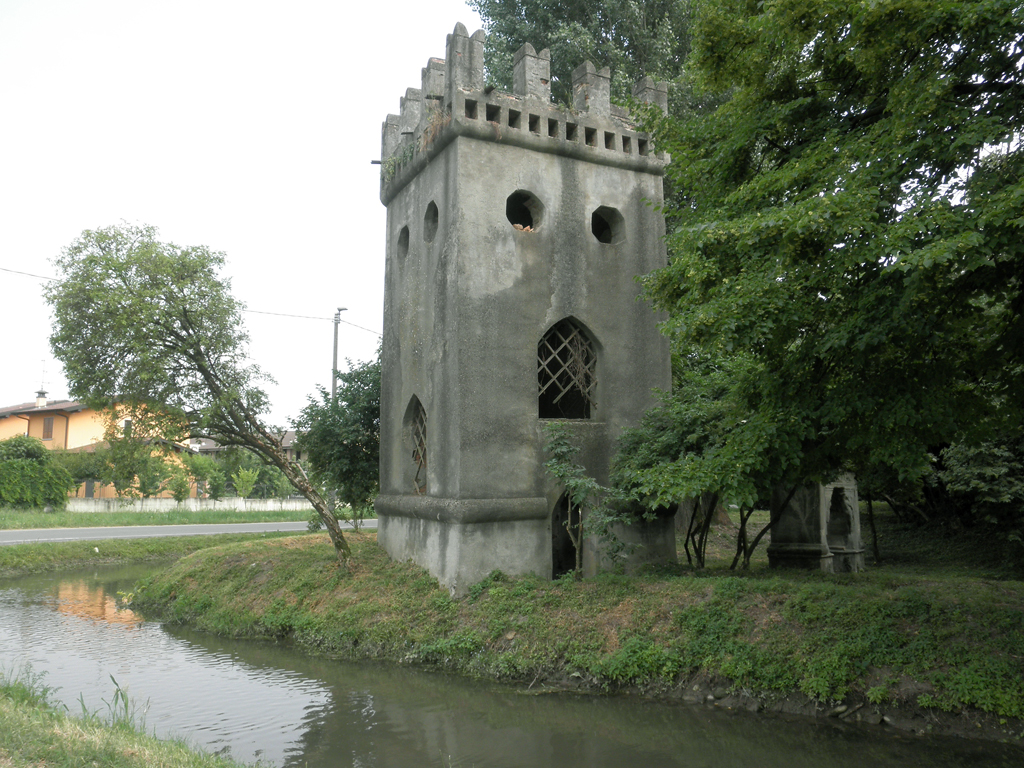 Torretta nel giardino di Villa Barni a Roncadello, frazione di Dovera.